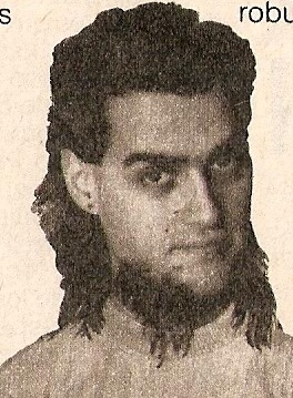 Roberto Pettinato, músico, conductor de tv y radio y escritor argentino